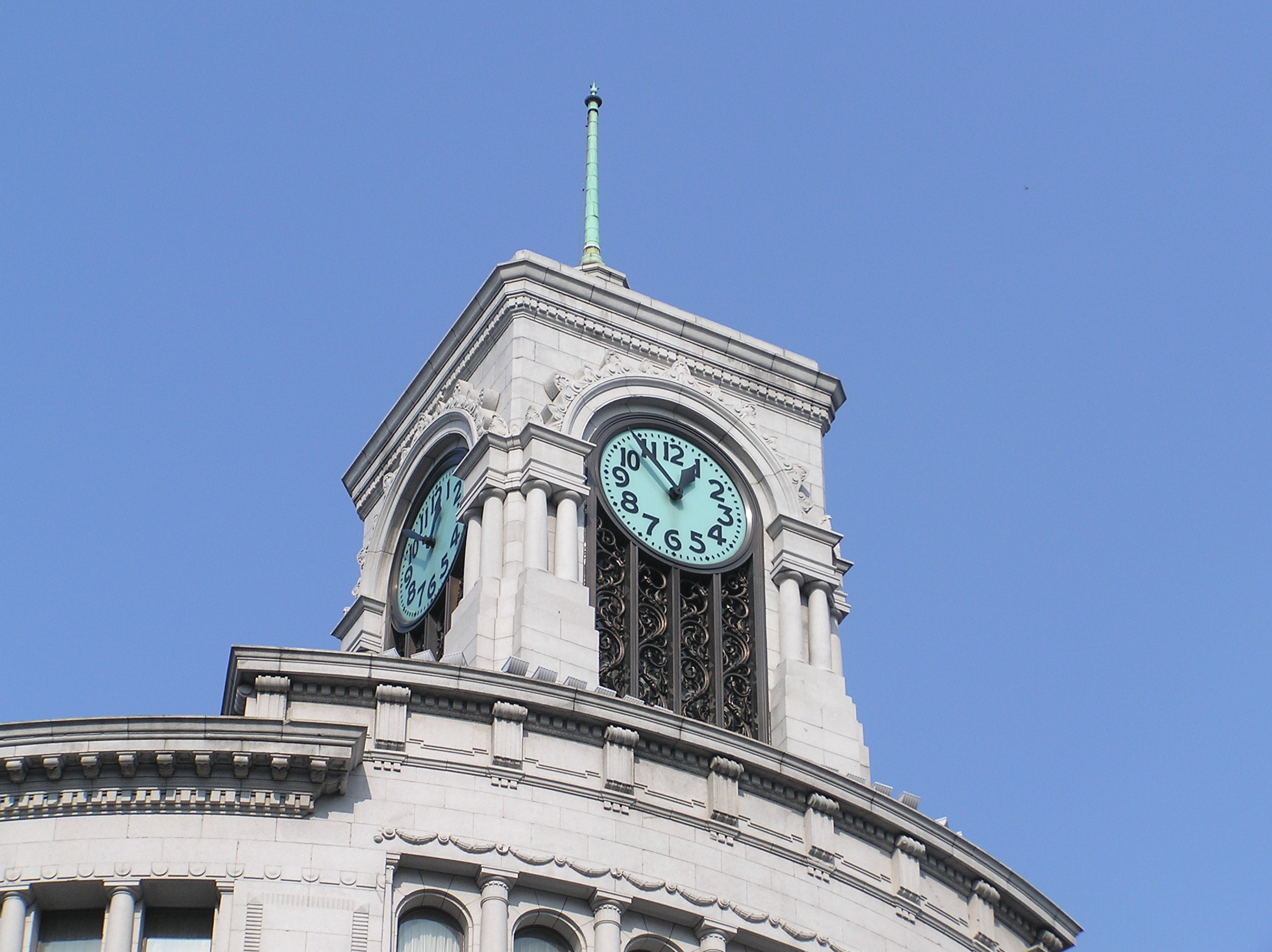 Wako